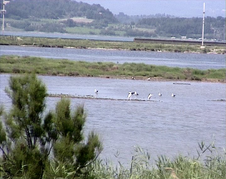 Frankreich, Canal de la Robine, Blick Richtung West zum Étang des Bages et de Sigean